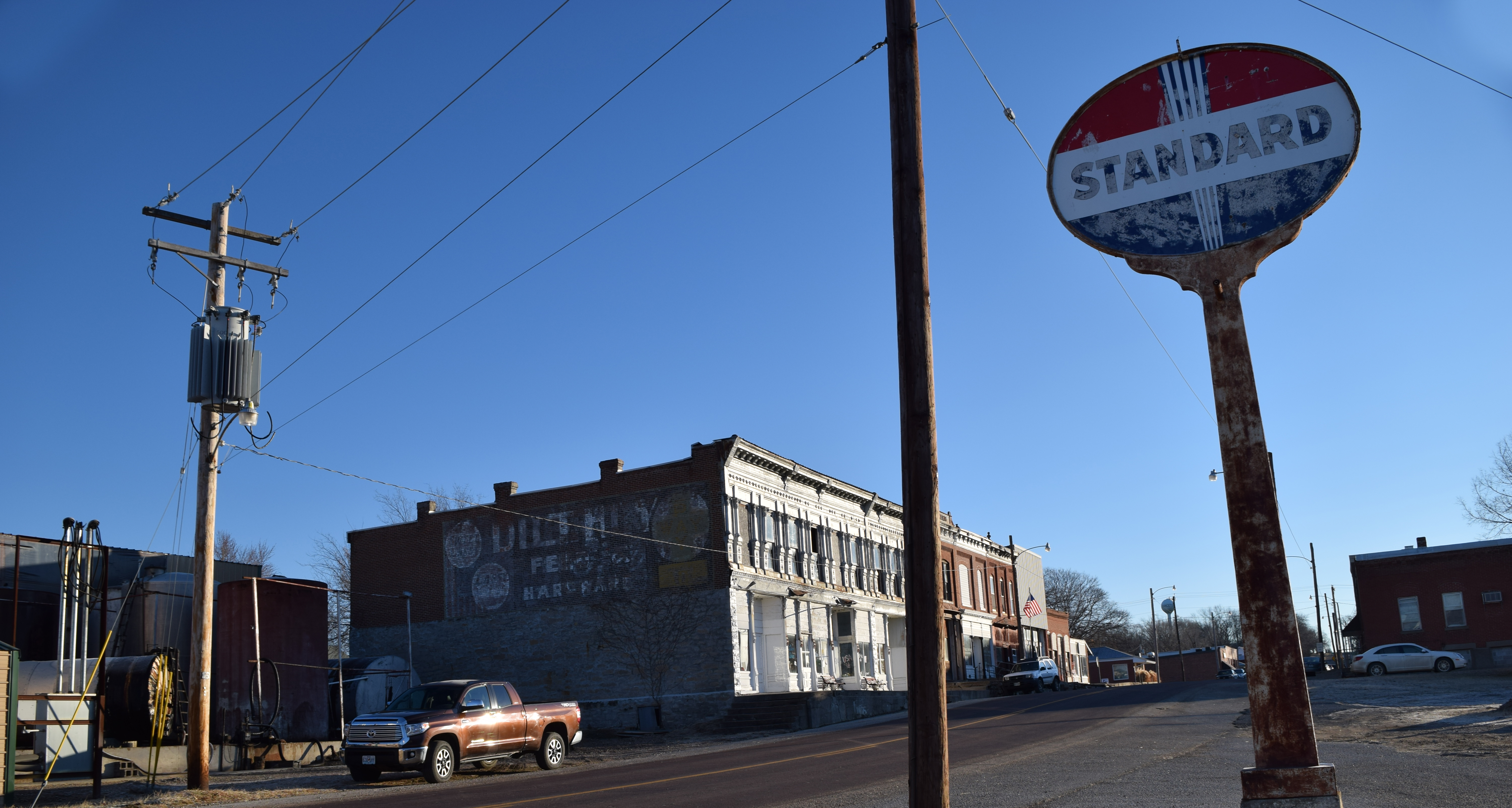 Bunceton, Missouri.